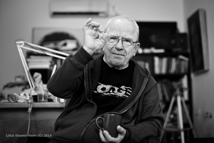 רפי יעקובי. צילום: ליטל שמר חיים